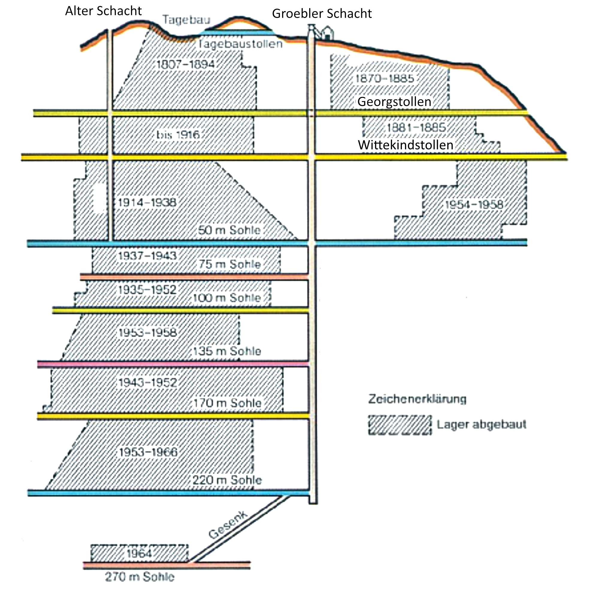 Schematische Darstellung der Schächte, Stollen und Strecken der Grube Georg-Joseph bei Wirbelau (Runkel). Hauptschacht war der Groebler-Schacht, Förderstollen der Wittekindstollen. Abbildung wurde nachbearbeitet (Farbe, Beschriftung, Schärfe)